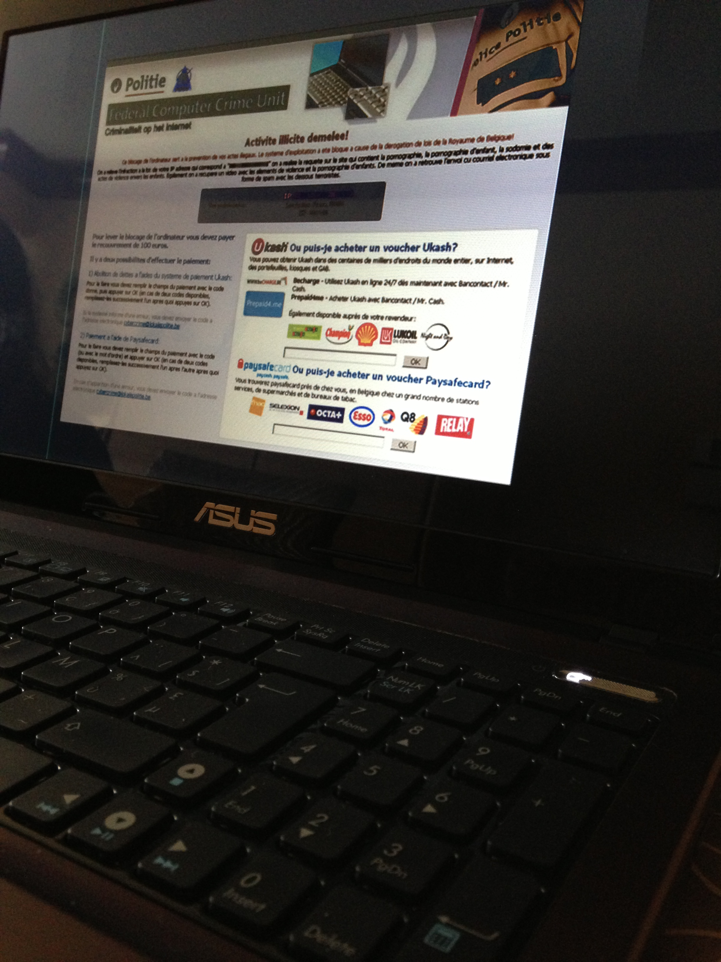 Een voorbeeld van het 'cyberpolitie-virus' op mijn eigen laptop.